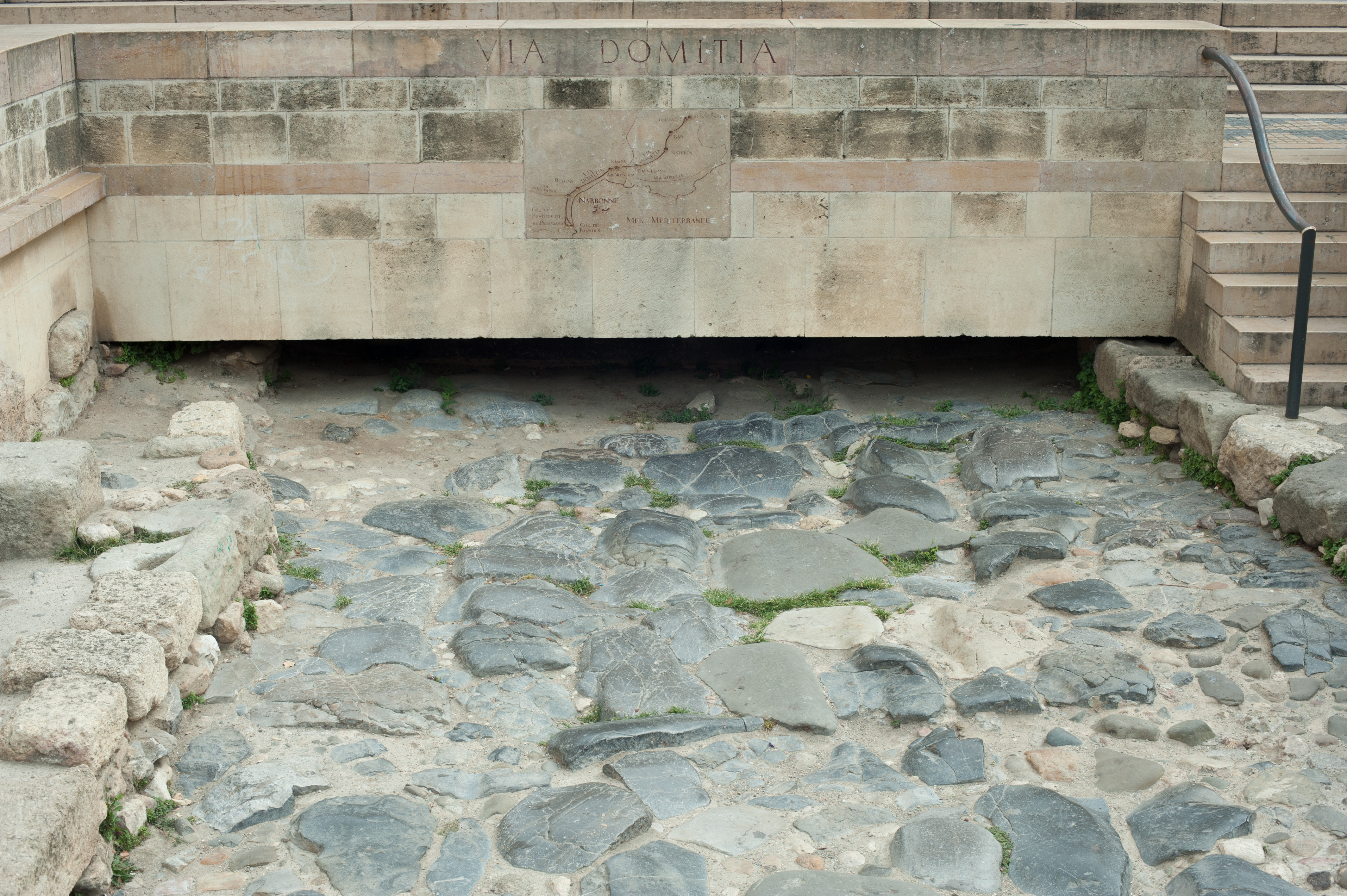 Stuk van de Via Domitia in het centrum van Narbonne